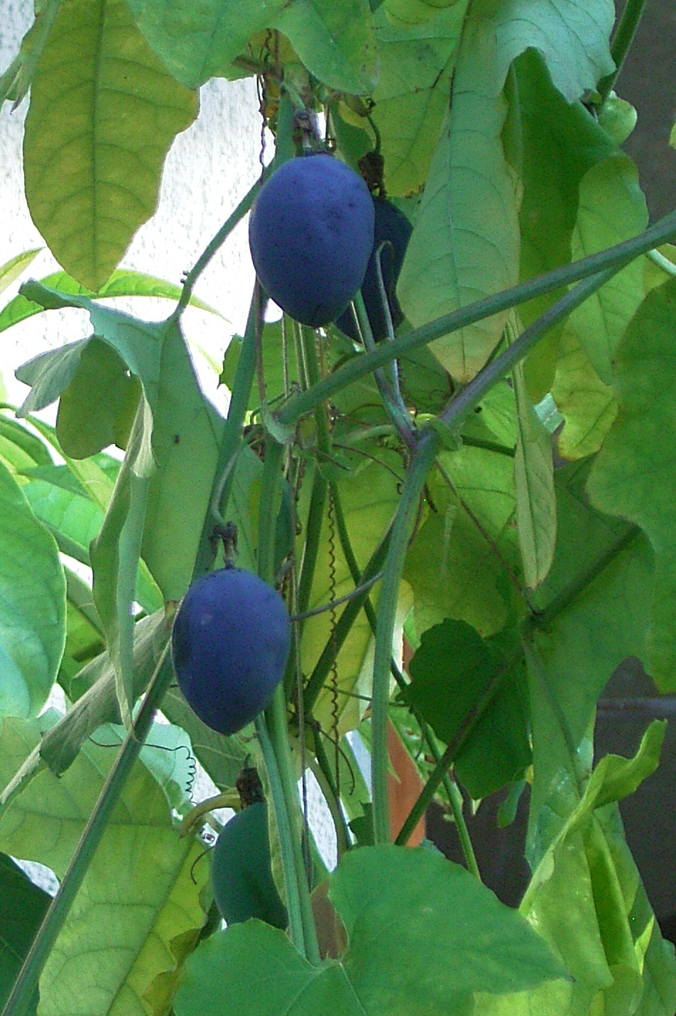 Passiflora morifolia, Fruits